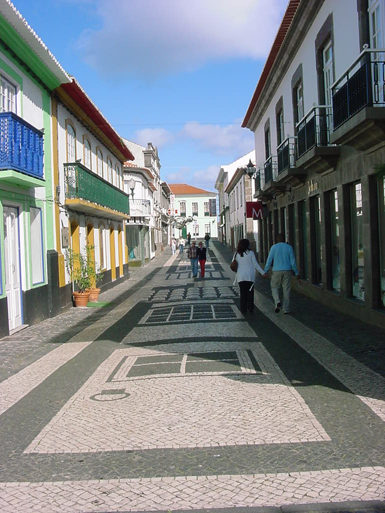 Rua de Jesus, Praia da Vitória, ilha Terceira, Açores